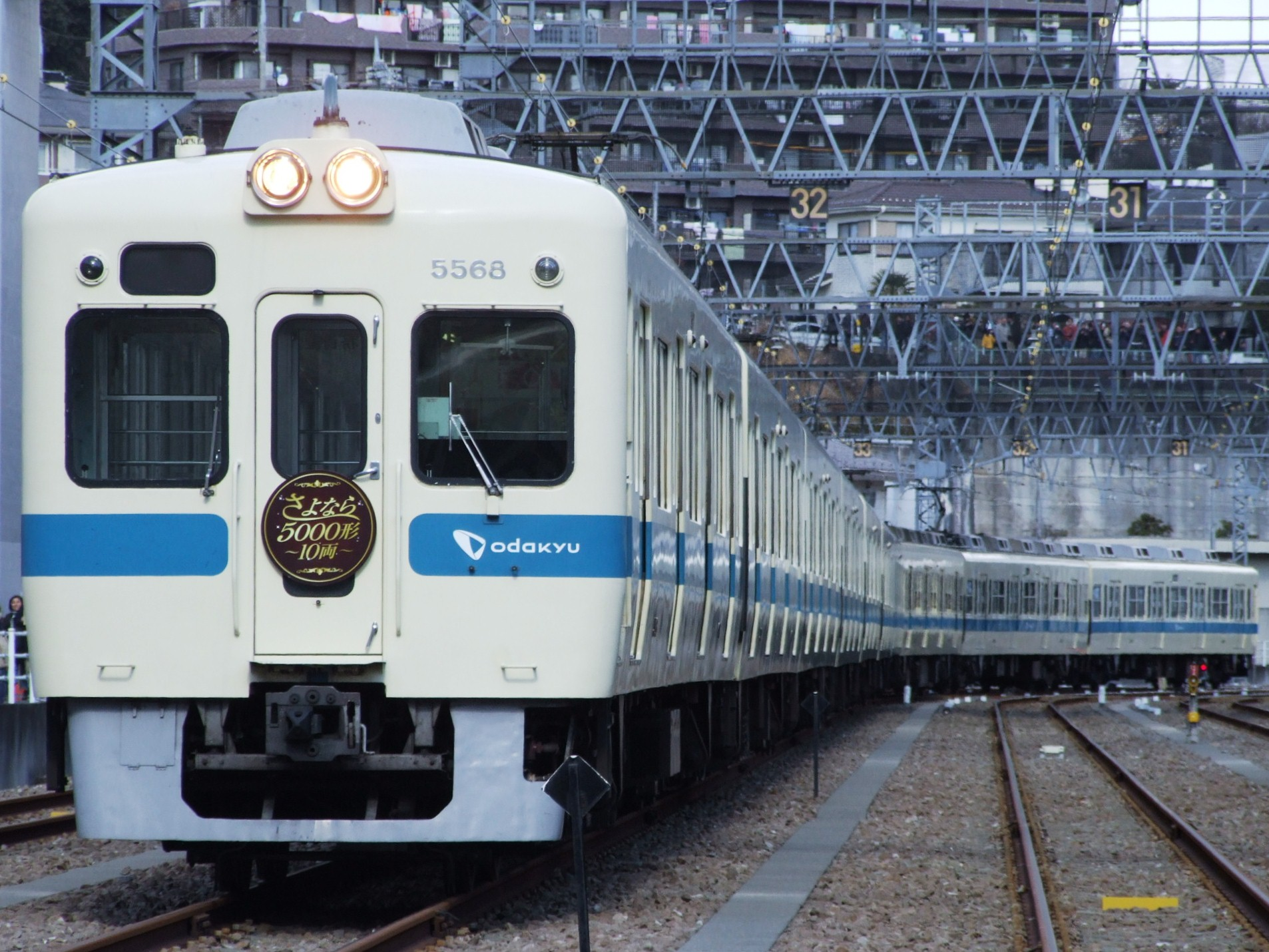 小田急電鉄5000形10両編成さよなら運転